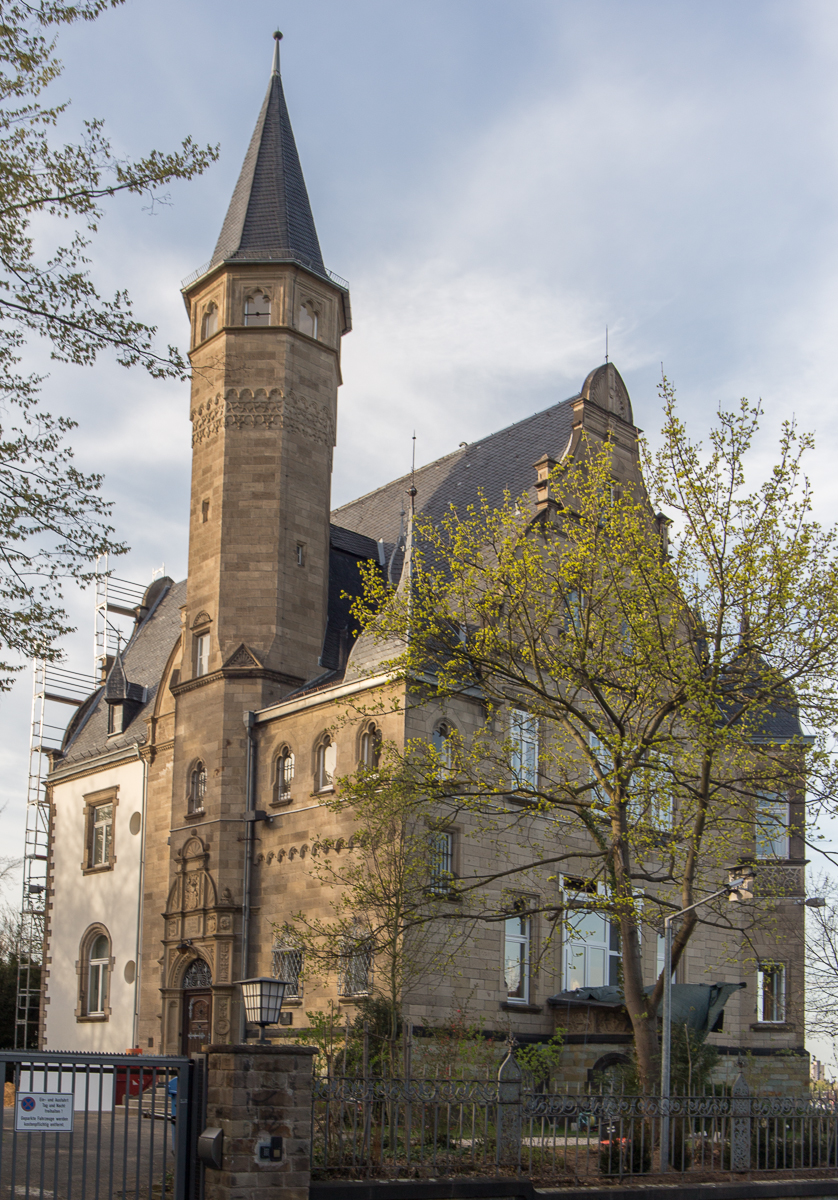 Villa Spiritus, Kaiser-Friedrich-Straße 19, Bonn: Ansicht von der Kaiser-Friedrich-Straße